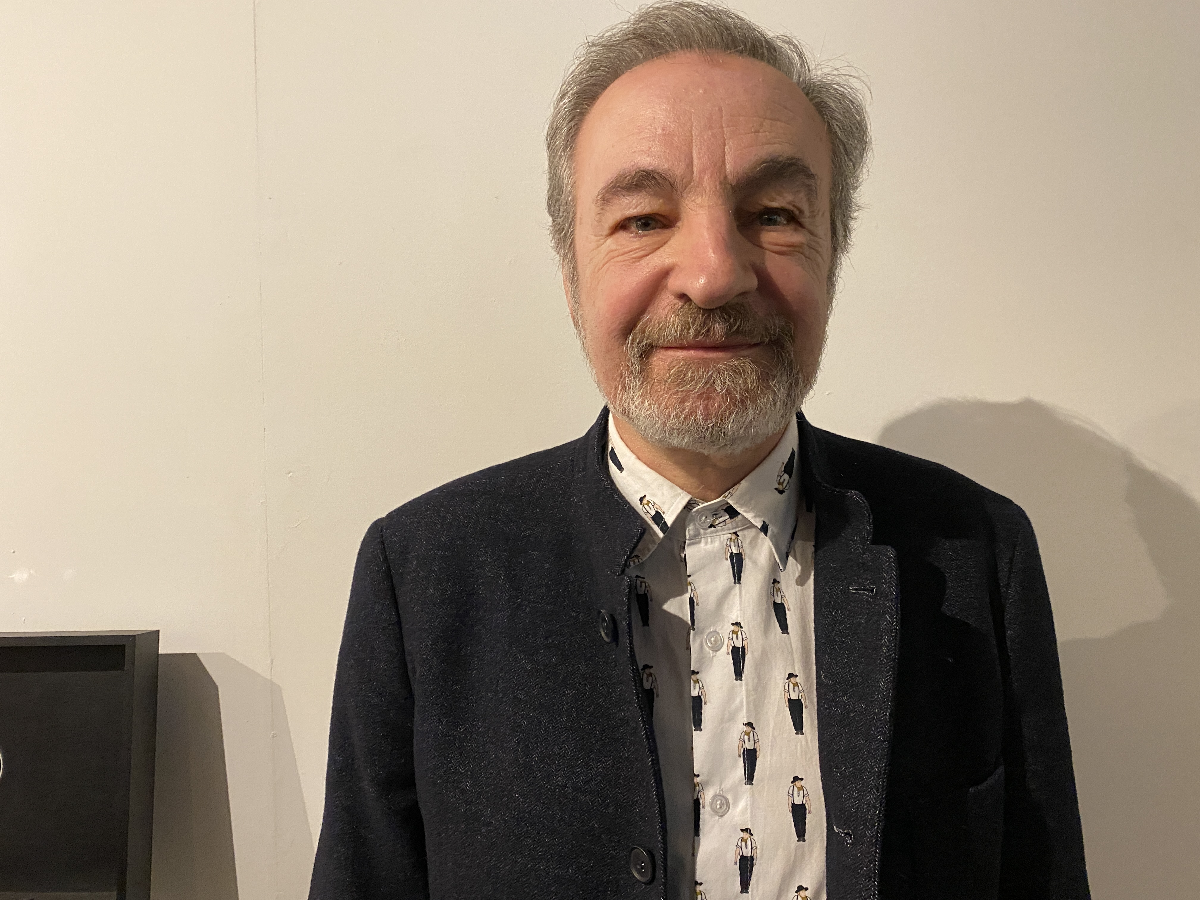 portrait